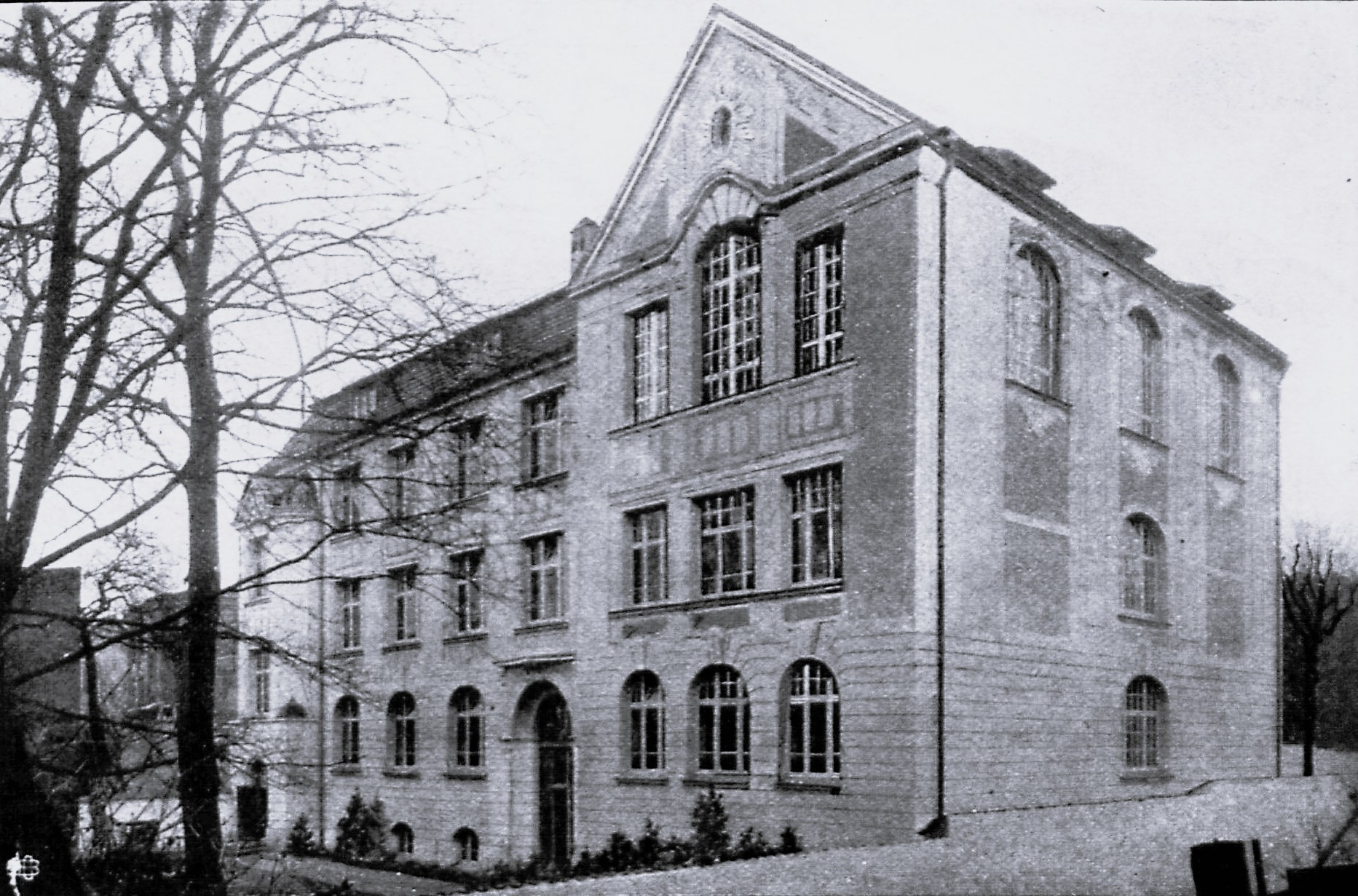 Gebäude des Schullehrer-Seminars und der Übungsschule in Lübeck